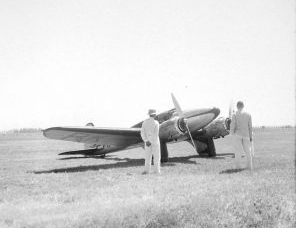 Negatief. Het Walraven W.2 (reg. nr. PK-KKH) vliegtuig van de heer Khouw op Morokrambangan, Soerabaja, Java